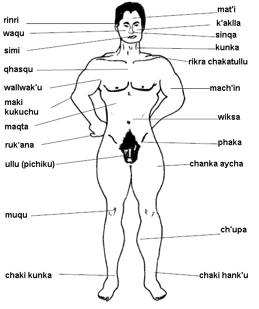 Runa Simi: Qharip kurkun